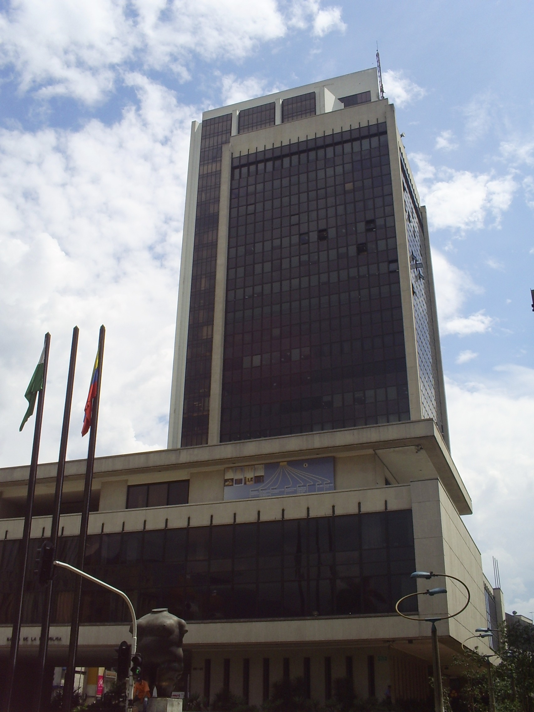 Banco de la República, Medellín, Colombia.